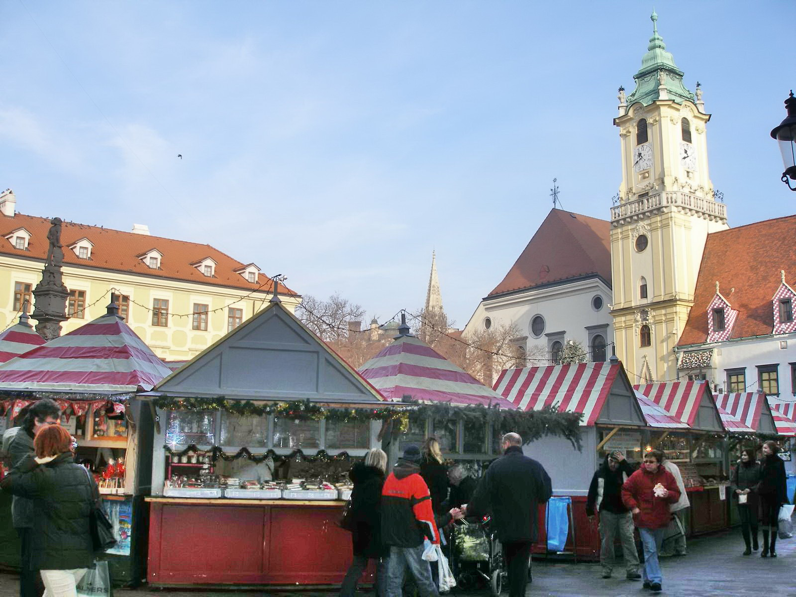 Vianočné trhy v Bratislave